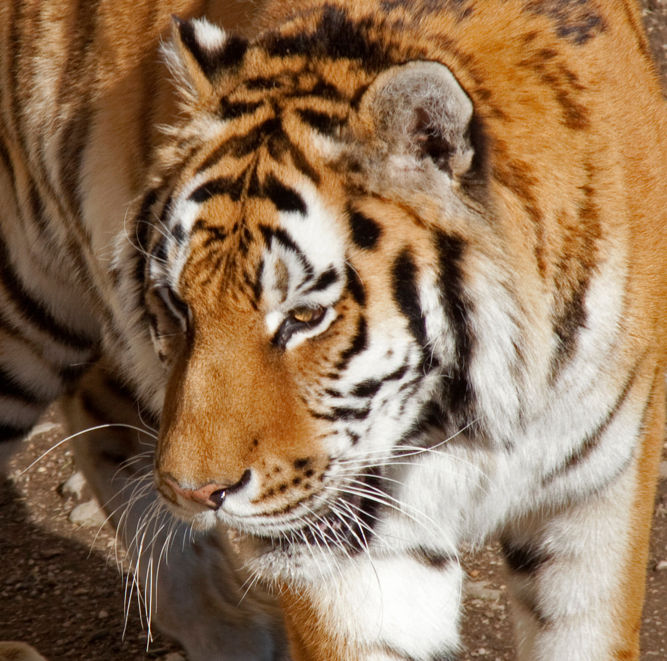 Amur Tiger 3d